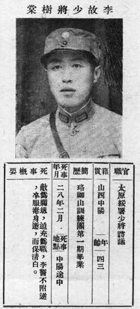 中文（台灣）: 抗戰軍人忠烈錄第一輯中的烈士遺像